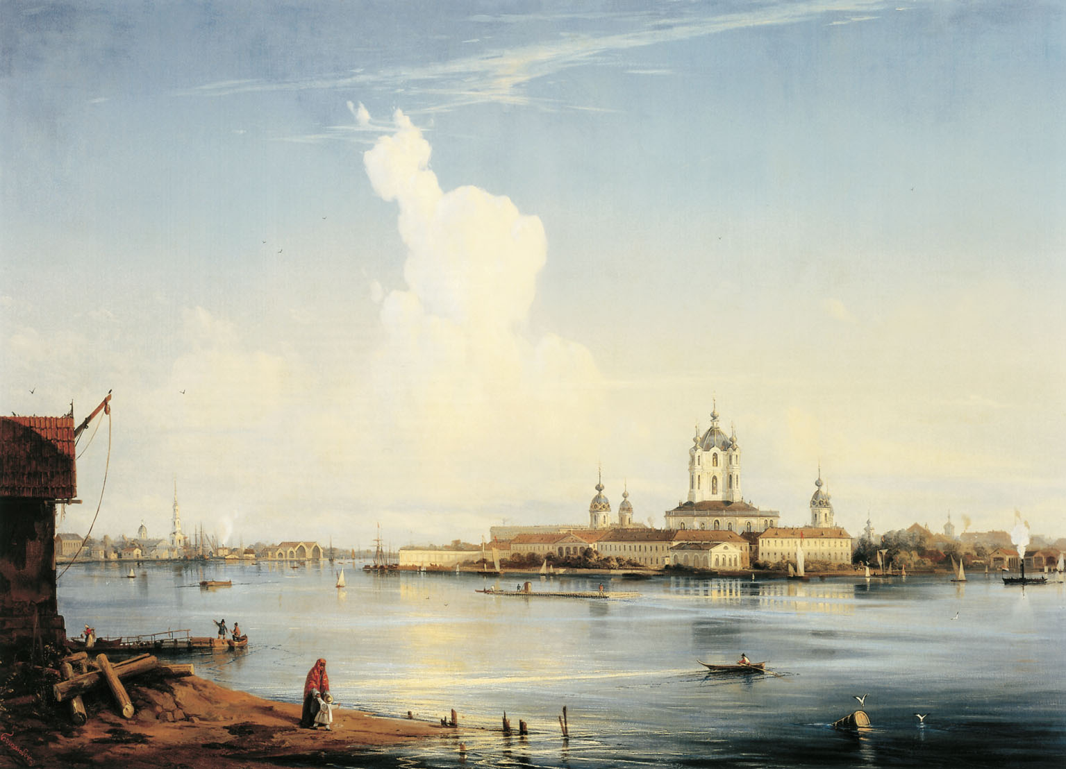 Smolny as seen from Bolshaya Okhtalabel QS:Lru,"Вид на Смольный монастырь со стороны Большой Охты." label QS:Len,"Smolny as seen from Bolshaya Okhta"